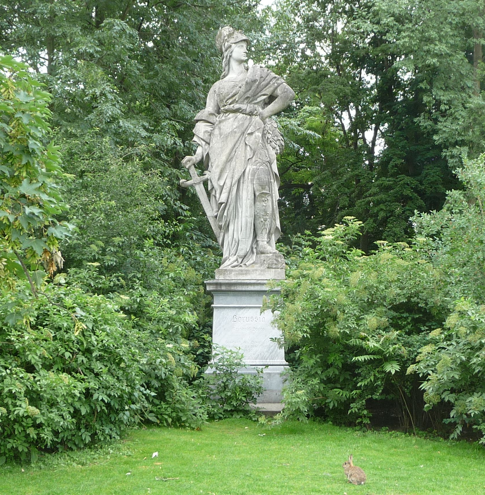 Borussia